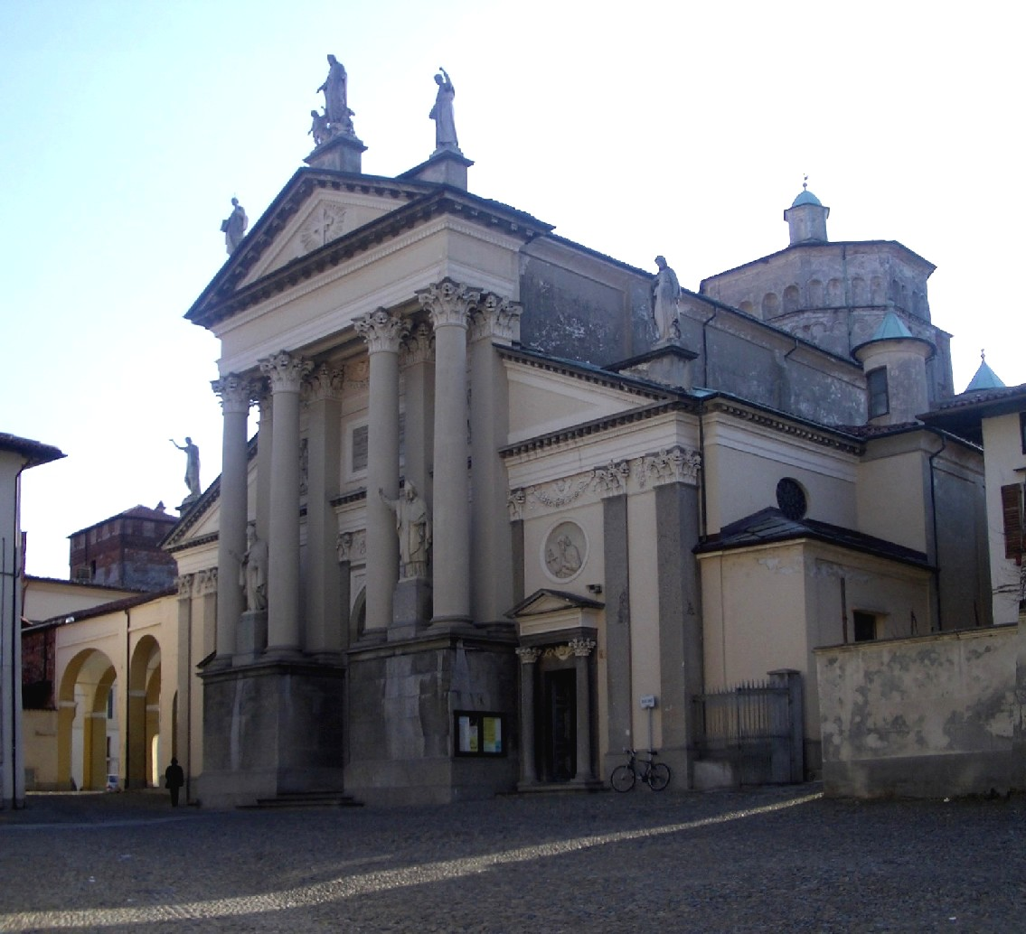 my photo